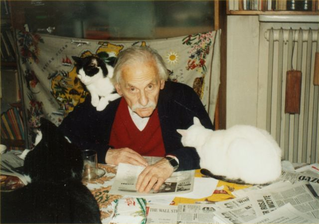 Mieczysław Bibrowski (1908-2000), Polish lawyer, journalist and translator